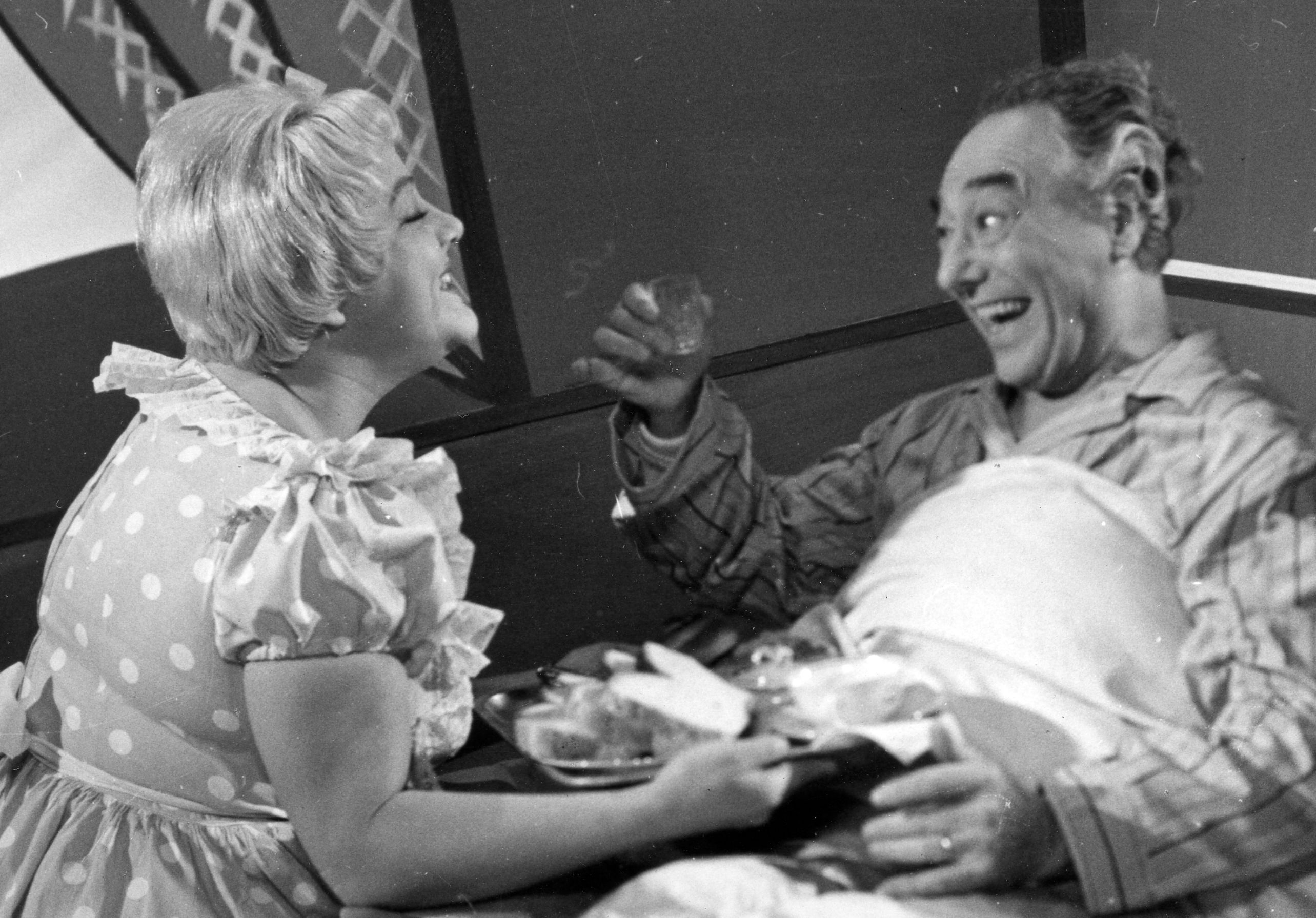 Csala Zsuzsa és Bilicsi Tivadar, valószínűleg a Színészek a porondon című 1963-as tévéfilmben